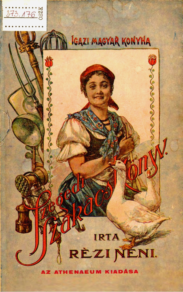 Rézi néni dolgos életében szakácskönyvének három kiadása jelent meg (ha a német kiadást – Szegediner Kochbuch, Burger, Szeged, 1882 – nem számoljuk). A második 1878-ban. Még két év sem telt el az első kiadás óta, de a Burger kiadó újra piacra dobja a Szegedi szakácskönyvet. Teréz nem győz dicsekedni sikerével a második kiadás előszavában: „…művem az igen tisztelt magyar gazdasszonyok részéről oly figyelemben részesült és oly jó keletnek örvendett”. Majd hozzáteszi, az új kiadást jelentékenyen bővítette, sőt az év minden napjára szóló étlapfüggeléket is szerkesztett a könyvbe. Aztán a hatodik kiadásban (Bp., Eggenberger, 1897) Rézi óriás lesz. A kis kötet lexikonnyi téglává nő. A borító is megváltozik: megjelenik rajta Rézi néni, vagy legalábbis az, akit a pesti kiadó Réziként elképzelt: egy kedves mosolyú, kendős, népi viseletbe öltözött vidéki asszonyság, vastag kezében merőkanalat tart, előtte két darab hófehér liba kóricál.1901-ben Rézi nénit átveszi a híres fővárosi Athenaeum kiadó.